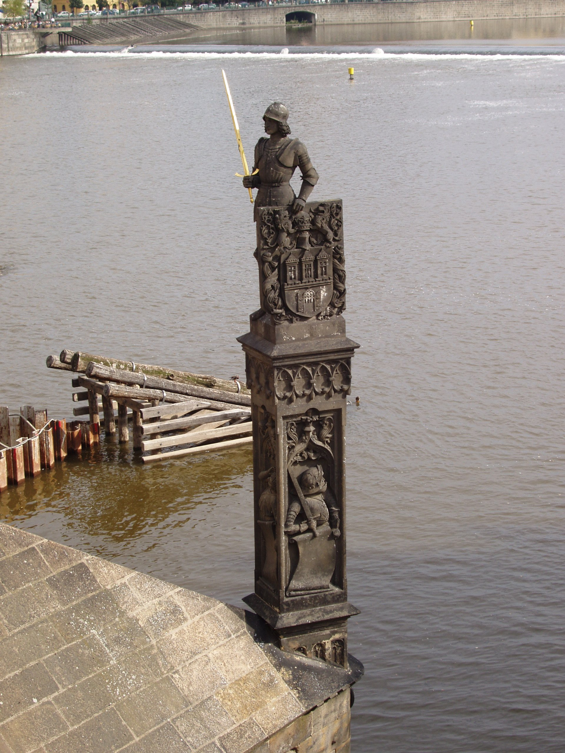 Praha, Karlův most, socha Bruncvíka.